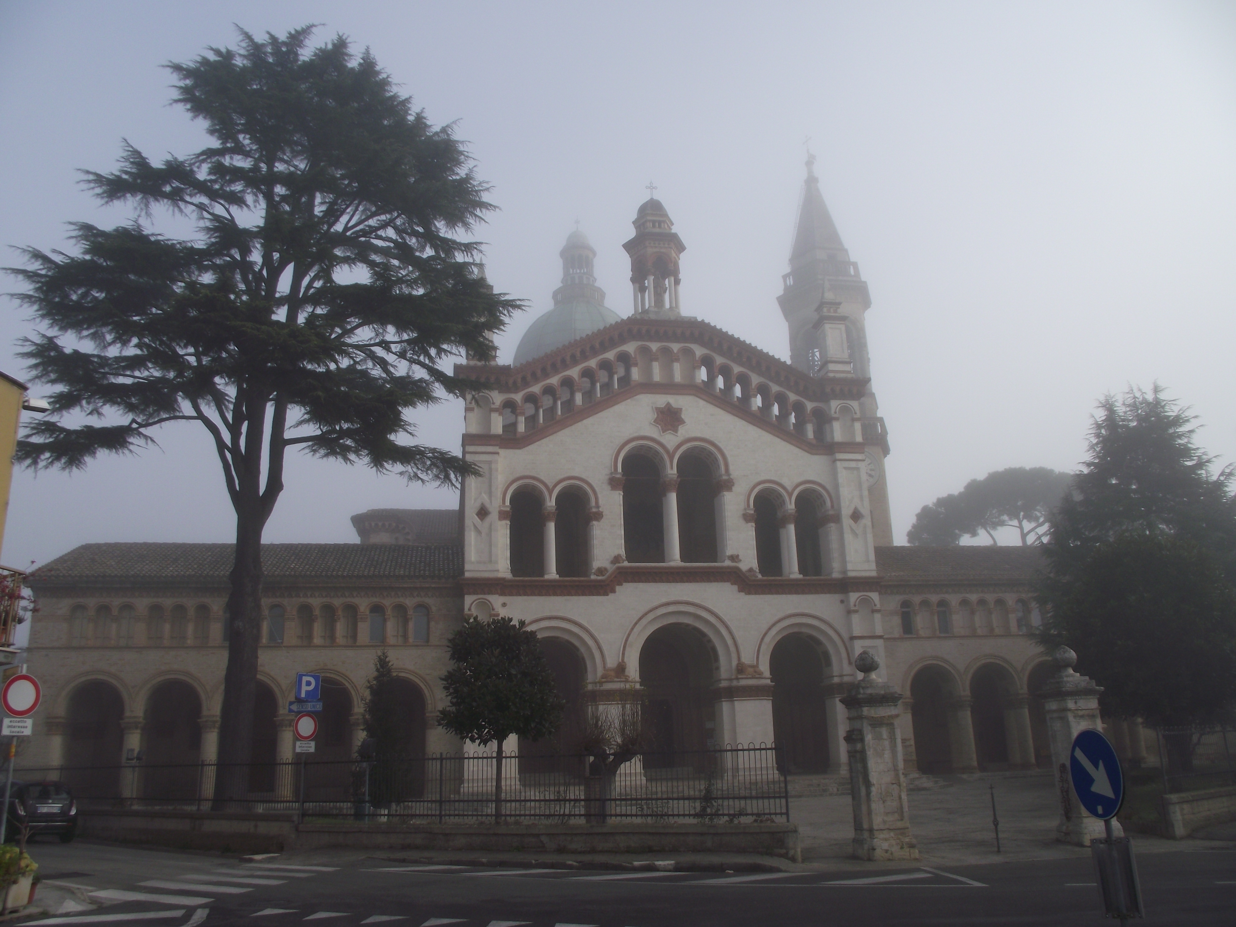 Osimo, Santuario di Campocavallo, XIX secolo